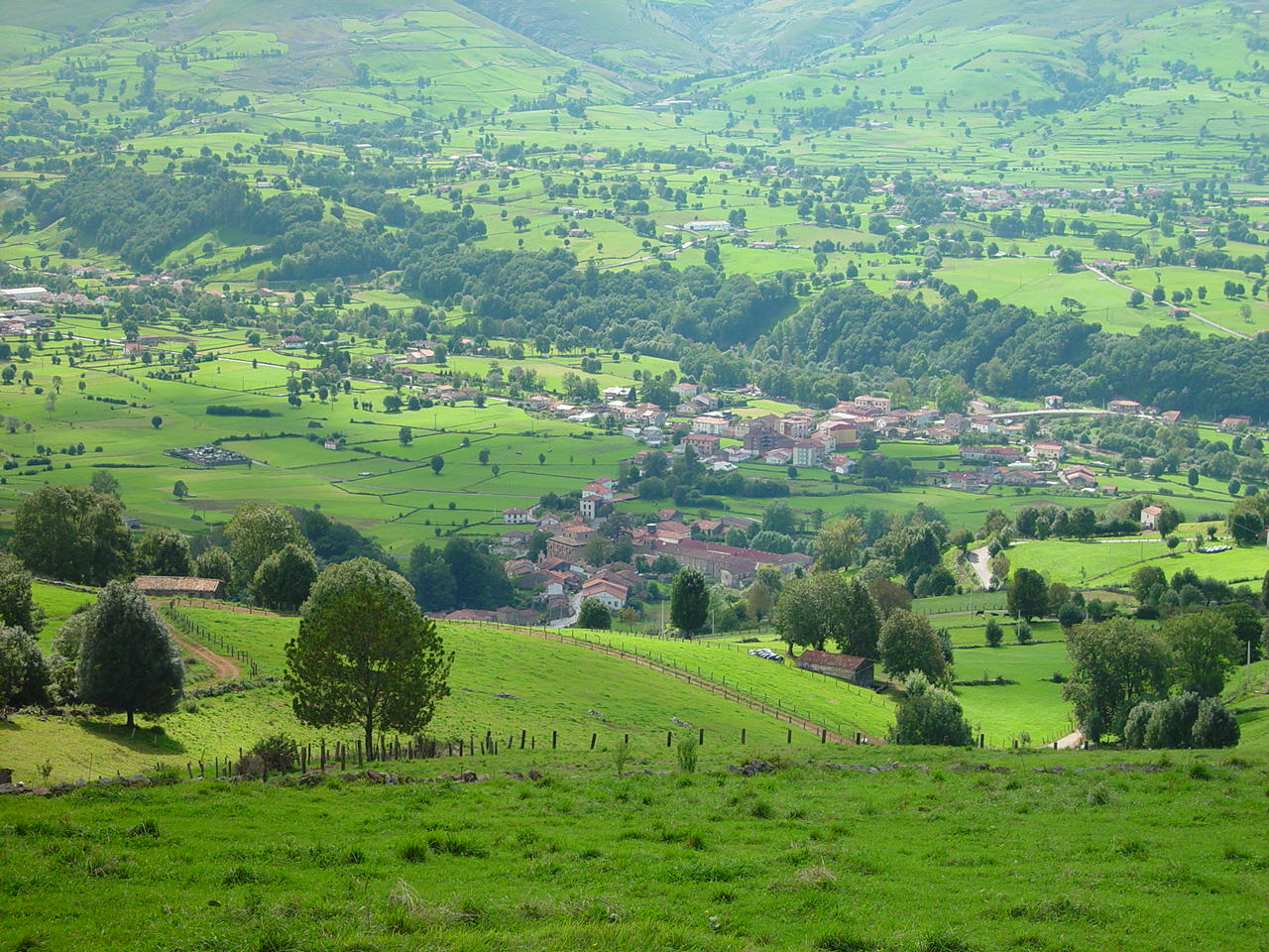 Villacarriedo